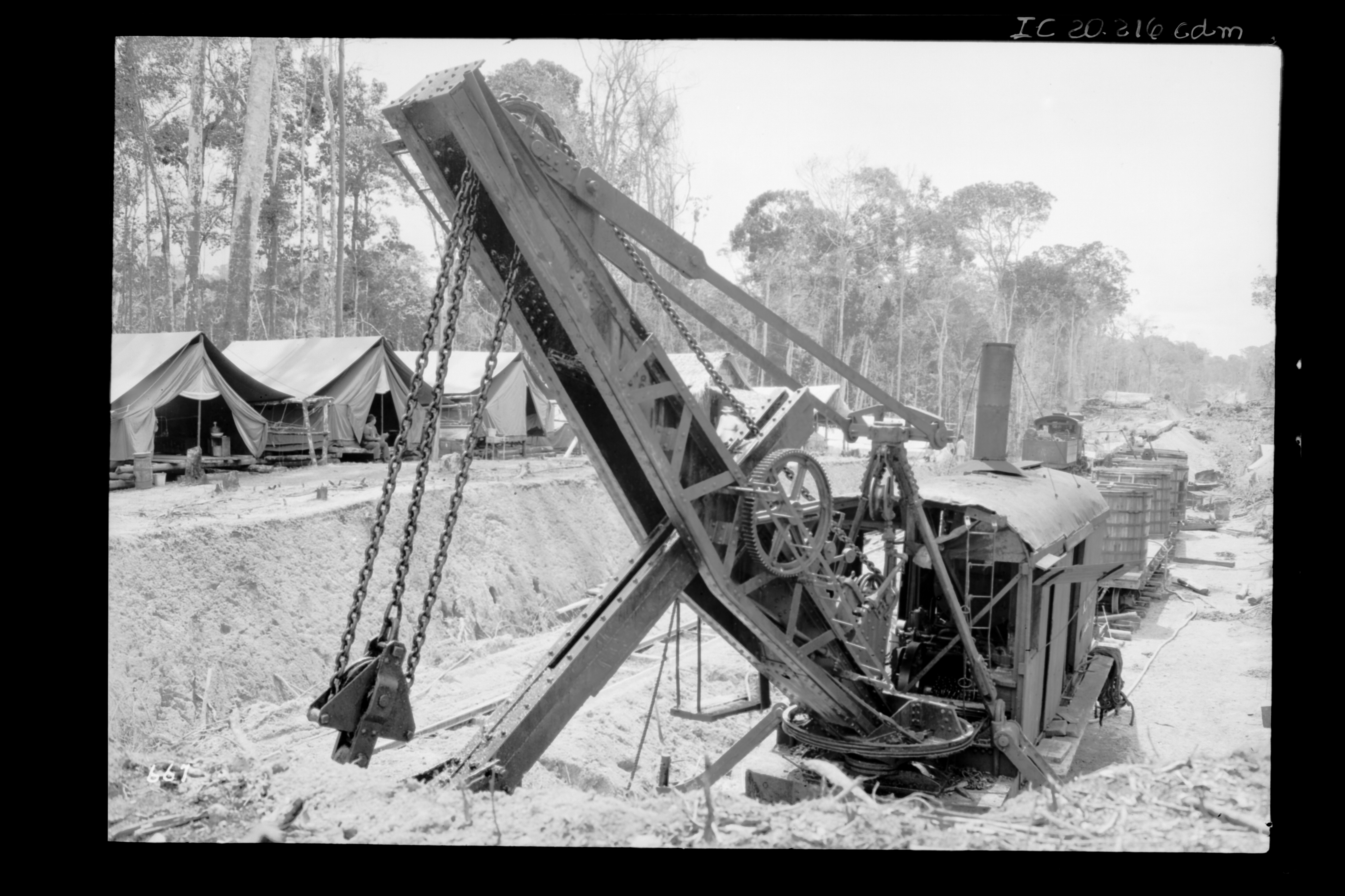 Obra que integra o acervo do Museu Paulista da USP. Coleção Dana Merrill.